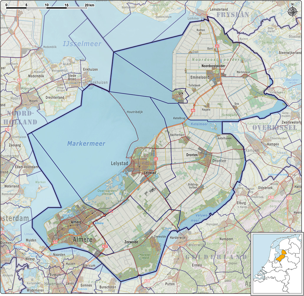 Kaart van de Nederlandse provincie Flevoland, met gemeentegrenzen per 2012 en impressie van het landschap. Referentie-ondergrond (kustlijn, steden, wegen) gerasterd uit de OpenStreet Map OSM. Inhoud is beschikbaar onder de Creative Commons Attribution-ShareAlike 3.0 license. Referentie-ondergrond op water bewerkt vanuit Gebruik is vrij met bronvermelding NLR en ESA. Vectorgrenzen van gemeenten op basis van het vrij te gebruiken geo-bestand van het CBS. Hoogte-aanduidingen (reliëf) gerasterd uit de AHN Viewer ( gebruik is vrij met bronvermelding (c) AHN, Overige kenmerken op de kaart: eigen tekenwerk.